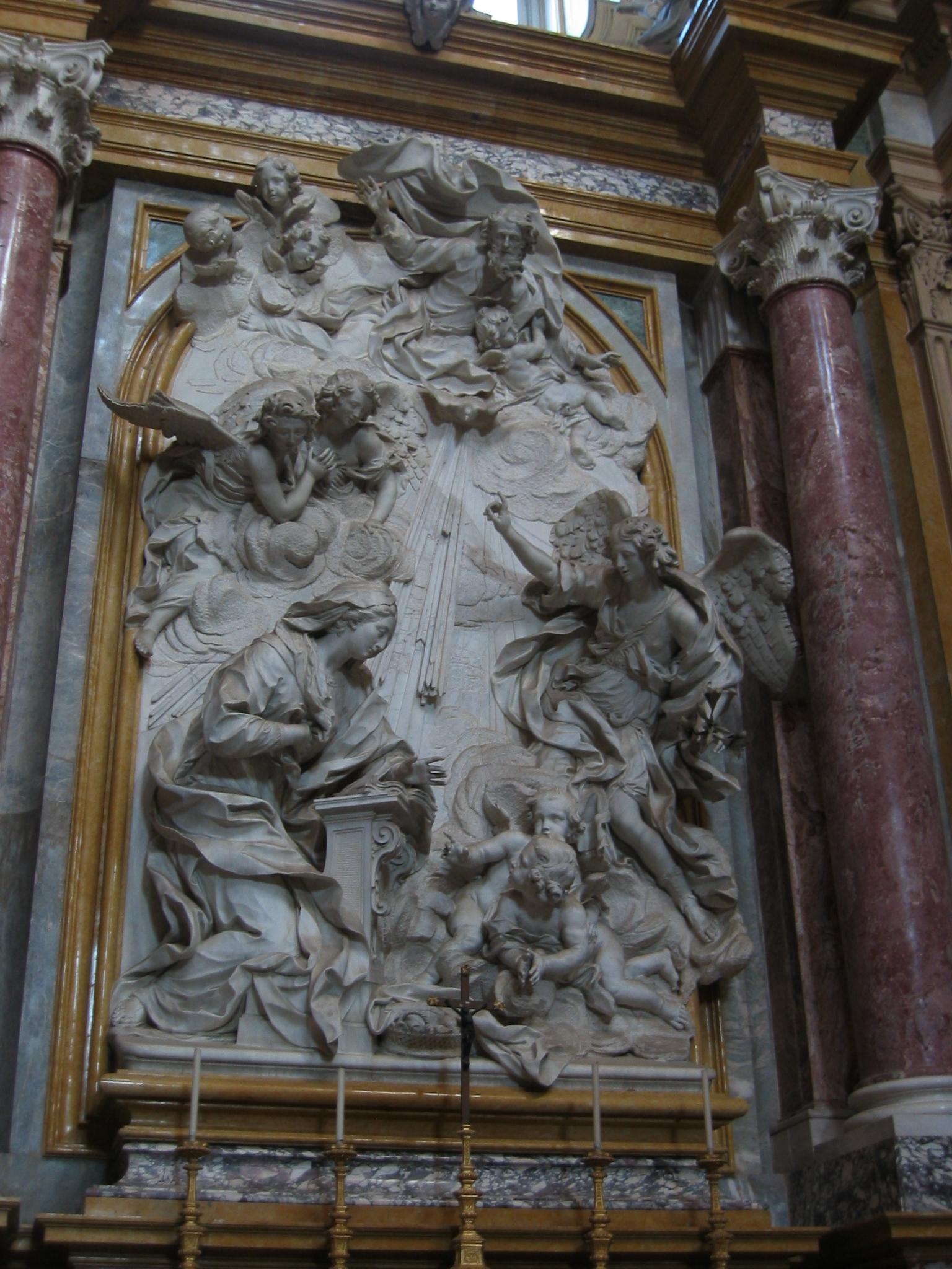 Basilica di Superga (Torino), Annunciazione barocca.